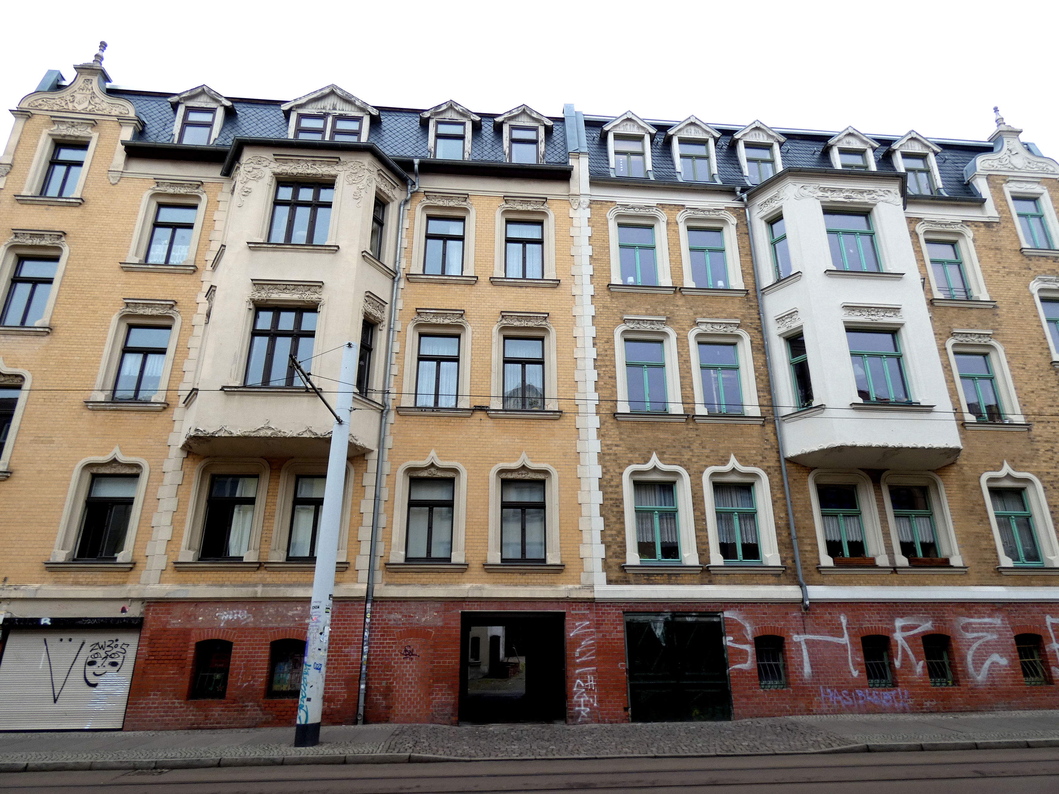 Häusergruppe Richard-Wagner-Straße 54 und 55, Halle (Saale)